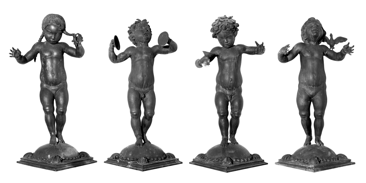 Vier allegorische Putten vom Sockel der Frühlingssäule, Ausschnitt aus einem Hinweisschild auf den Marmorsaal, Stuttgart, Weißenburgpark. Von links: Allegorien des Tanzes, der Musik, des Weins und des Gesangs.